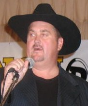 Mike Manuel